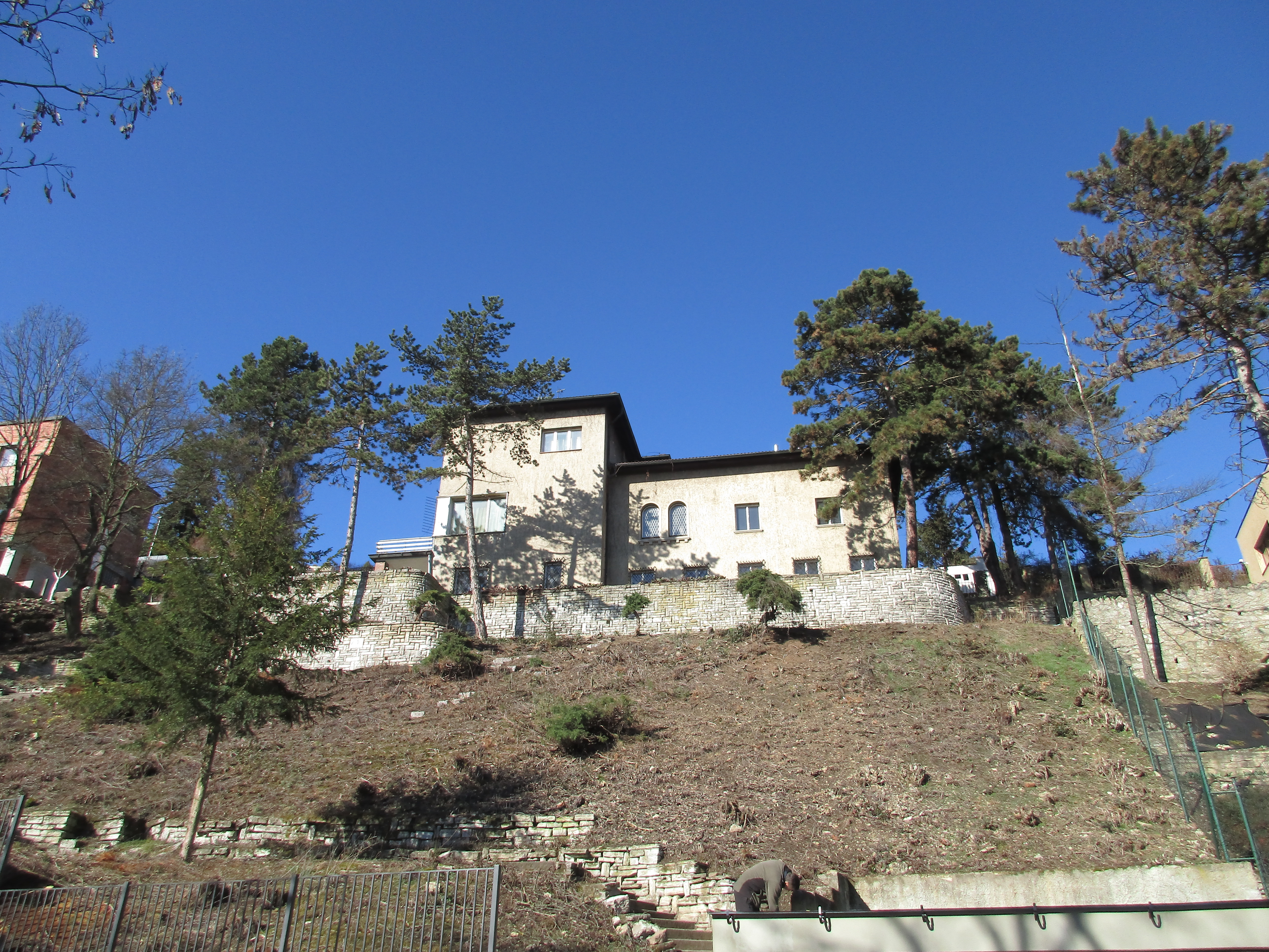 Barrandovská 186/24, Skalní 186/14, Praha 5-Hlubočepy